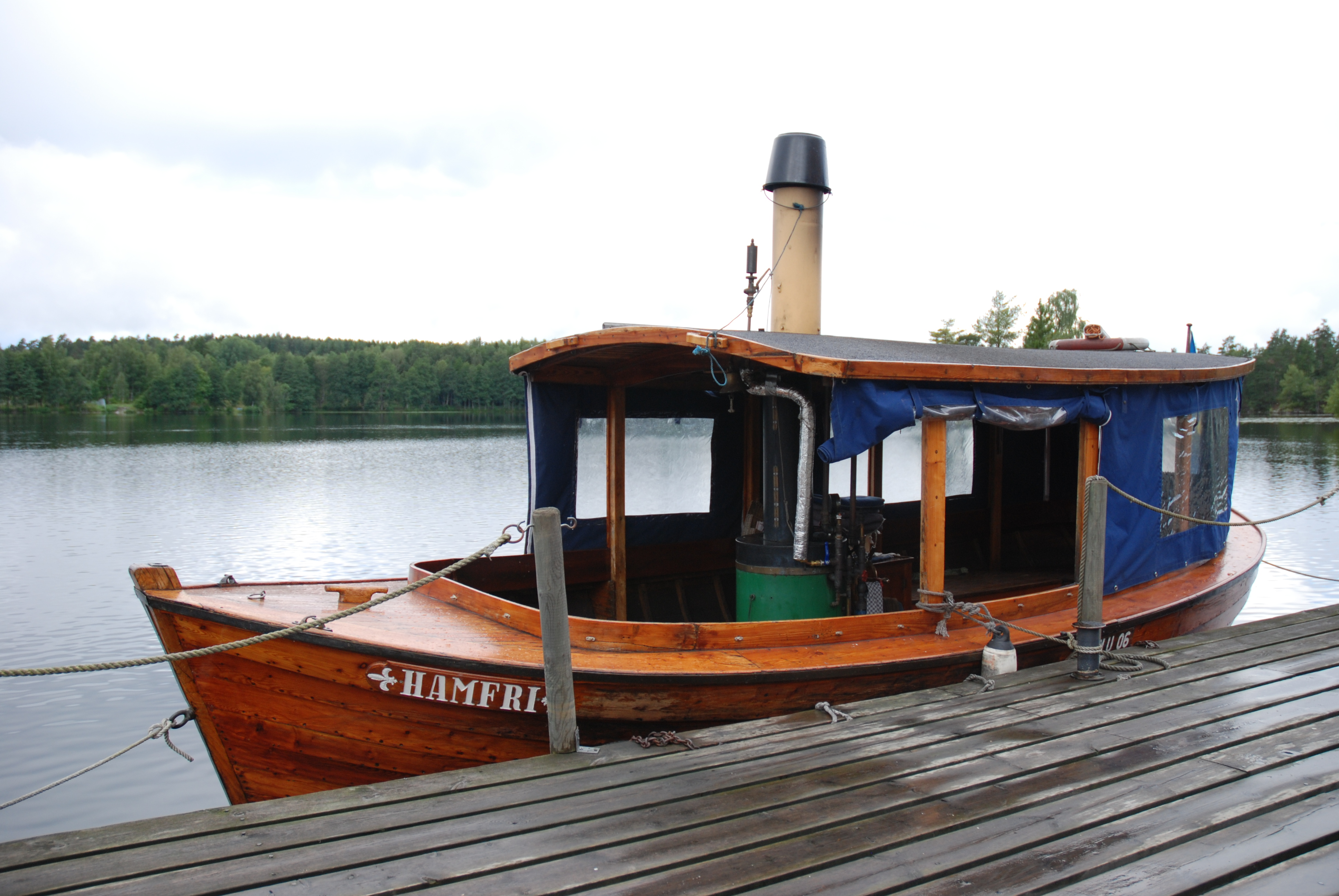 S/S Hamfri, Upperud, Dalsland, Sweden